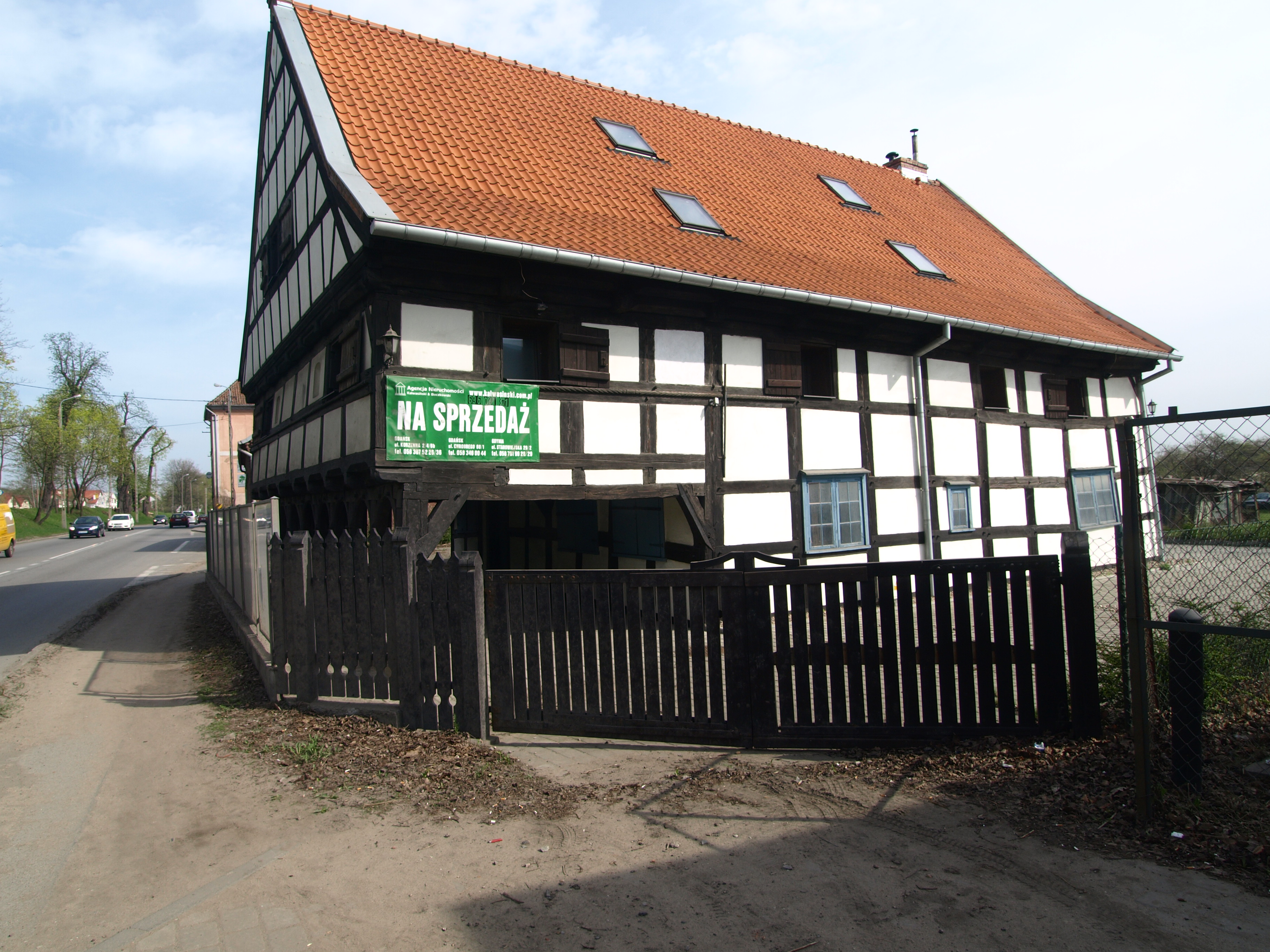 Gdańsk Lipce, Trakt św. Wojciecha 297 - dom podcieniowy (Lwi Dwór), poł. XVII